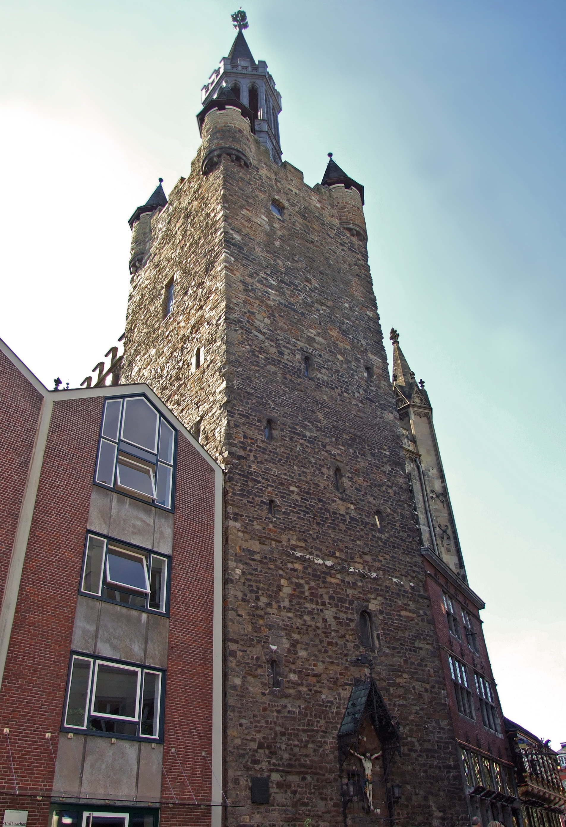 Granusturm in Aachen - Ostseite